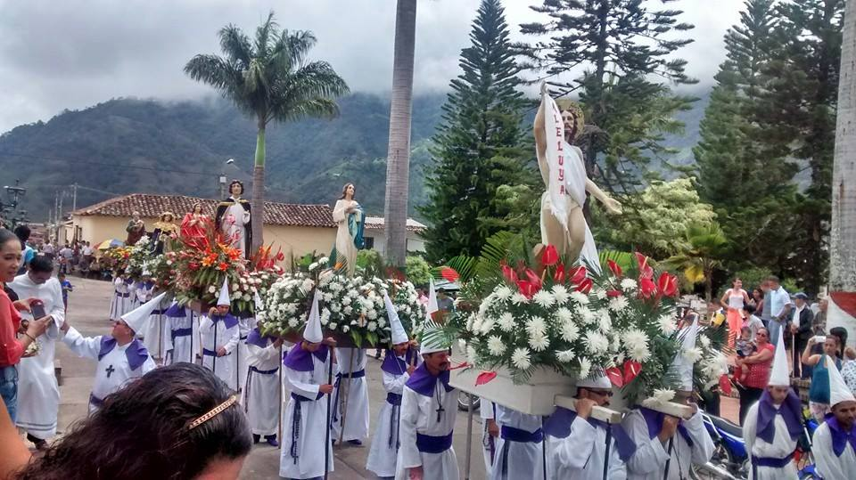 domingo